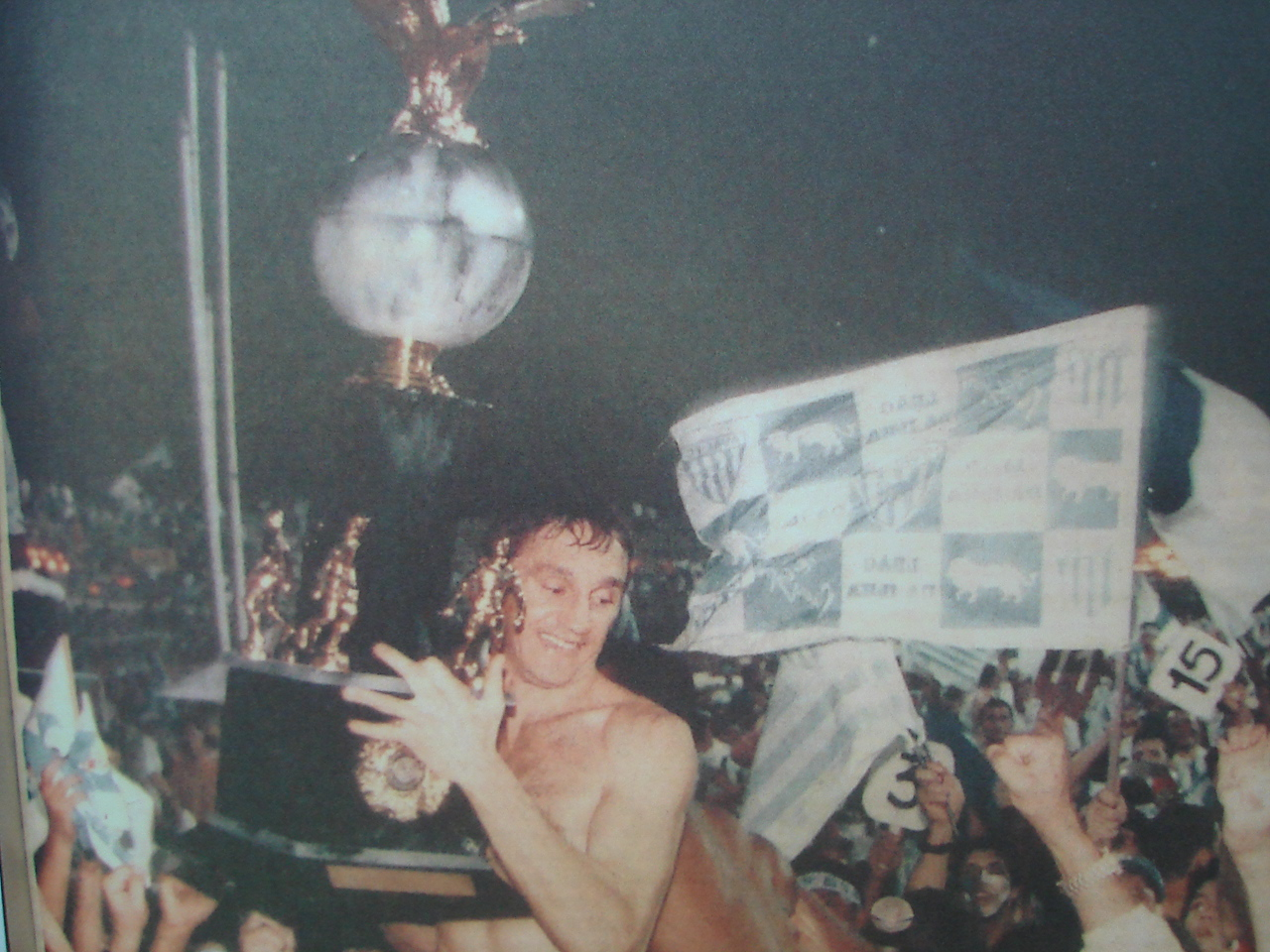 Título de 97